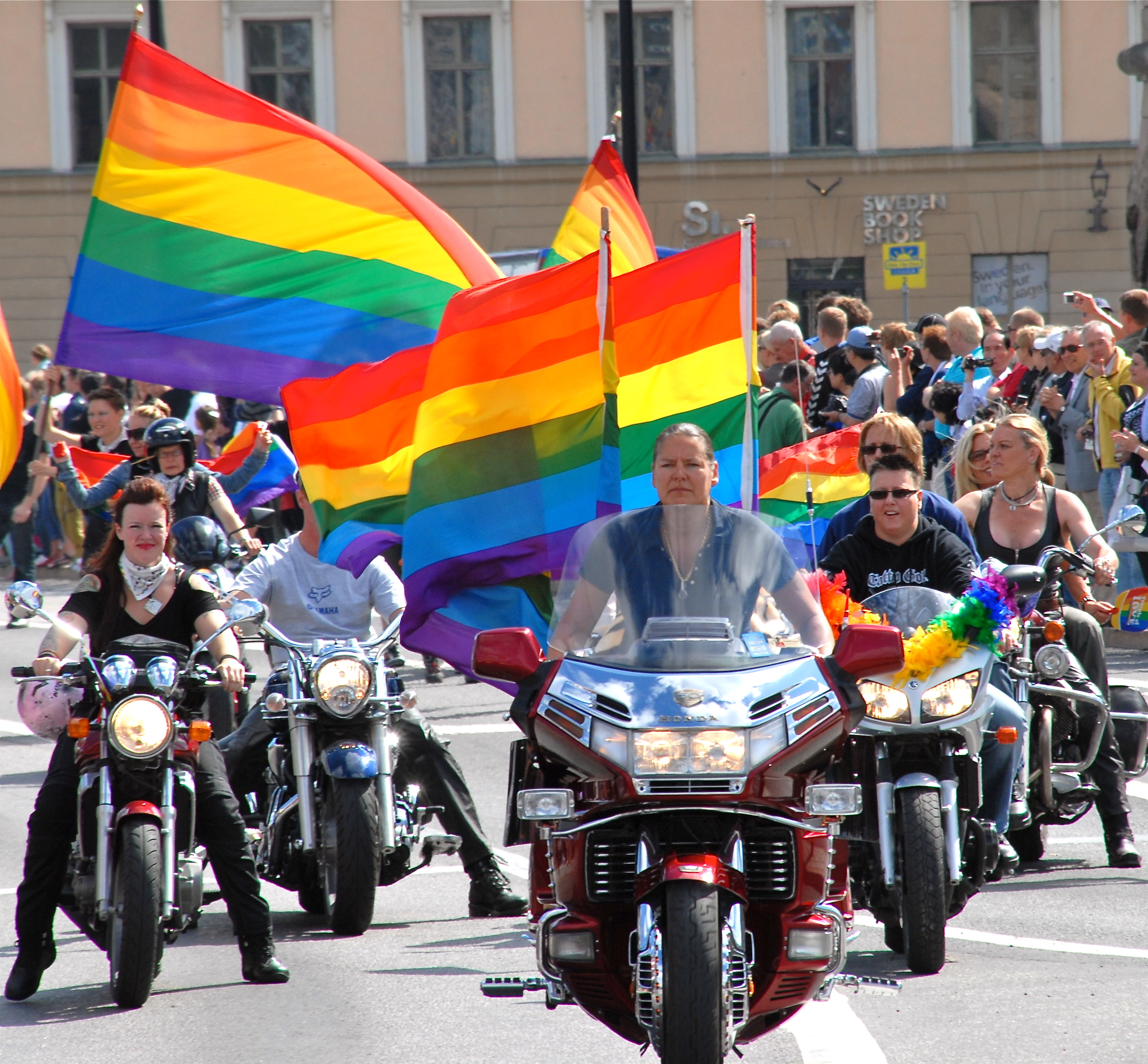 Prideparaden nedanför slottet under Stockholm Pride 2010.